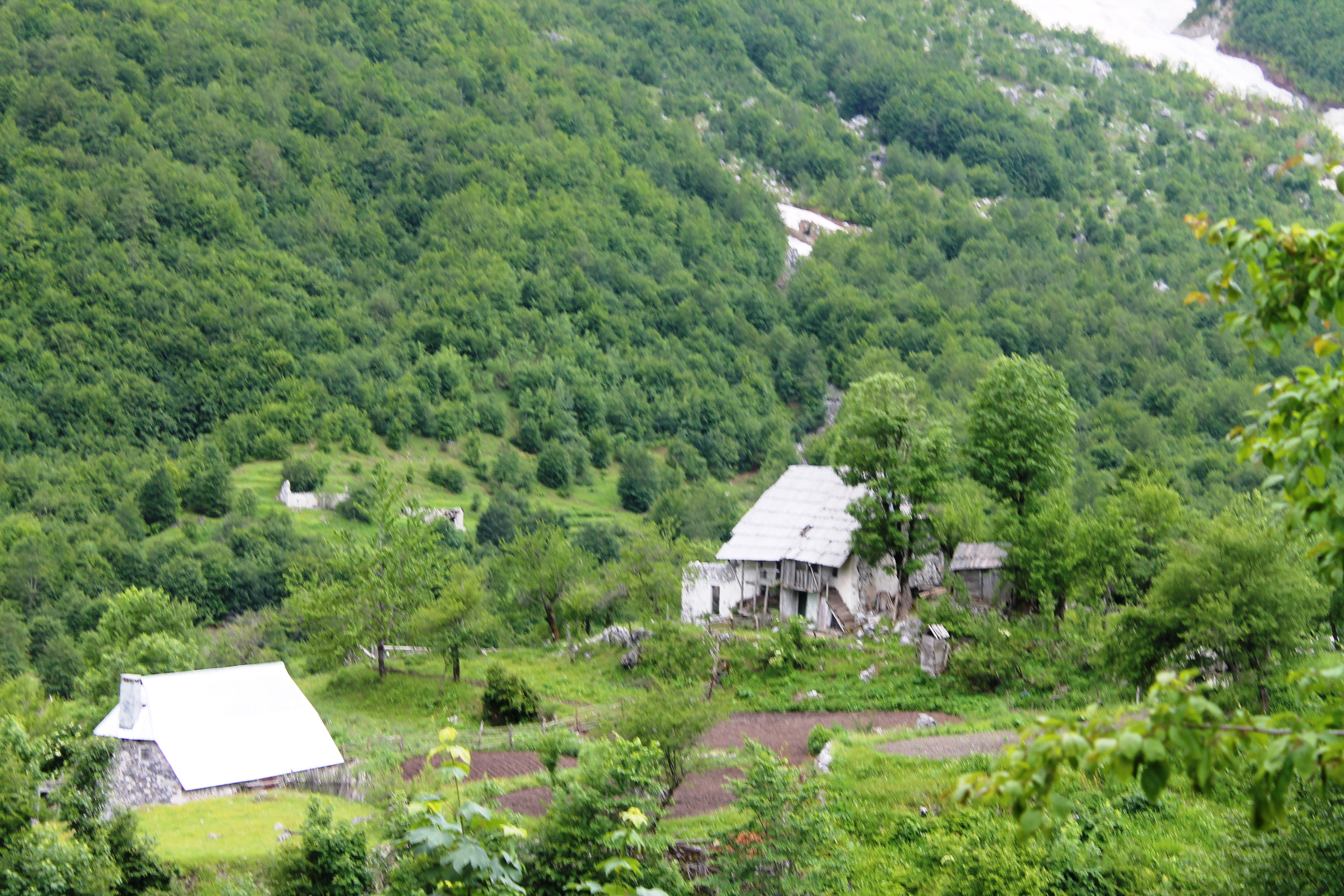 Kategoria:Fshatra